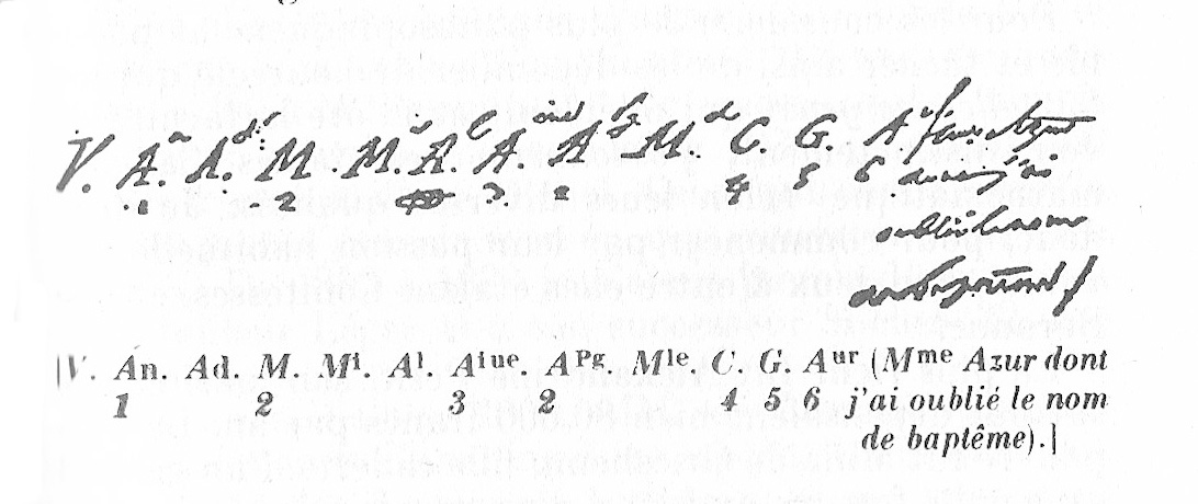 Liste des femmes aimées par Stendhal, telles qu'il l'a écrit dans le manuscrit de Vie de Henry Brulard en 1832.